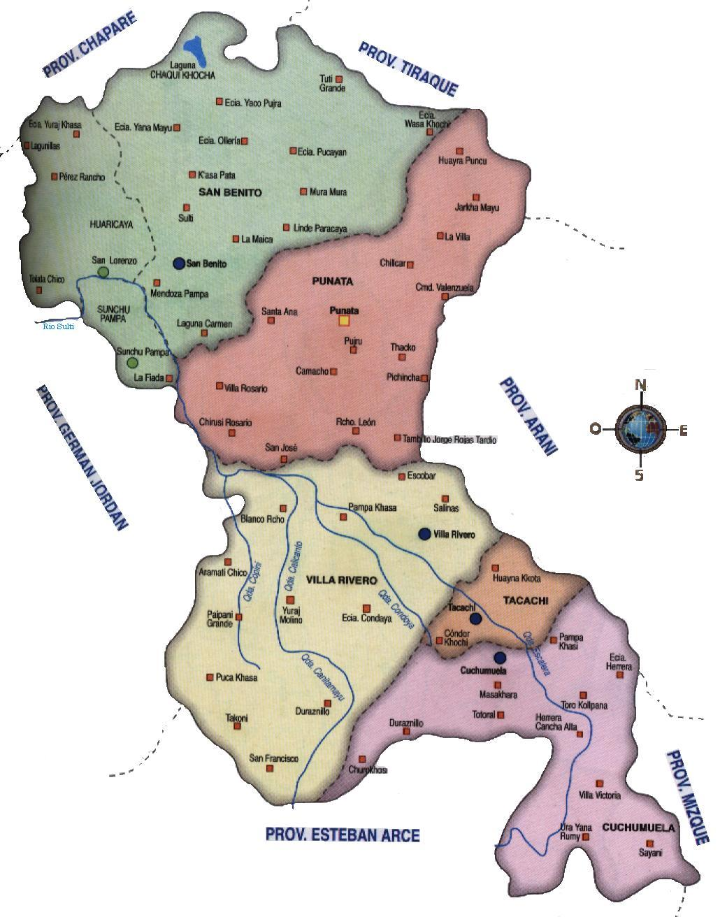 Mapa Político de la Provincia Punata